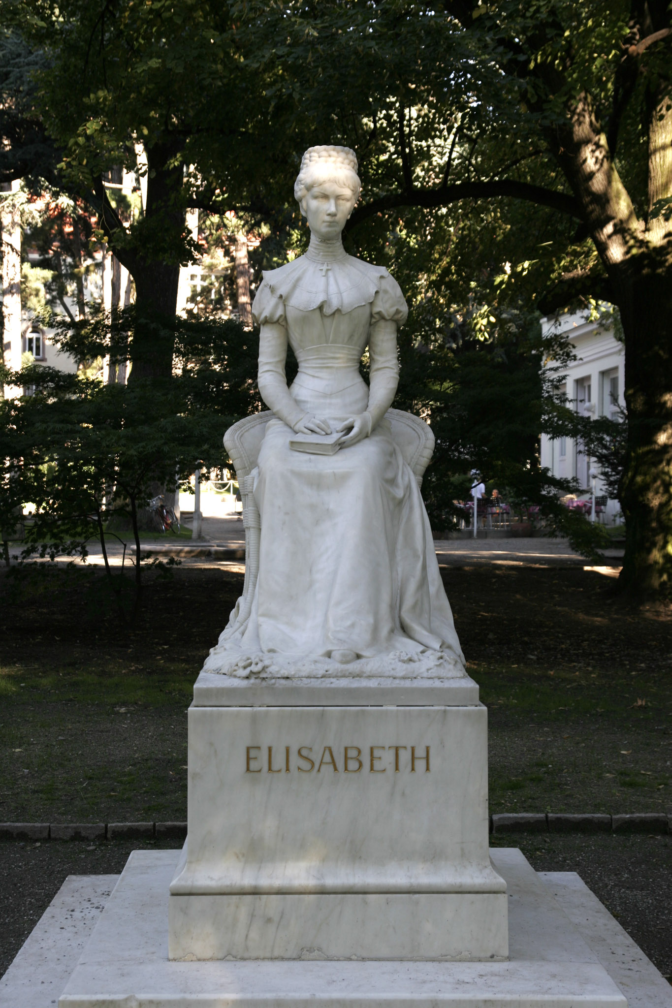 Denkmal für Elisabeth von Österreich-Ungarn in Meran. Statue von dem Wiener Bildhauer Hermann Klotz aus Laaser Marmor von 1903 in der Sommerpromenade in der Nähe der Postbrücke. Das Denkmal wurde von Emil Dalmata Ritter von Hideget gestiftet. vom 18. April 1903 Sport und Salon